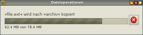 Copying a file into an archive using nautilus file manager